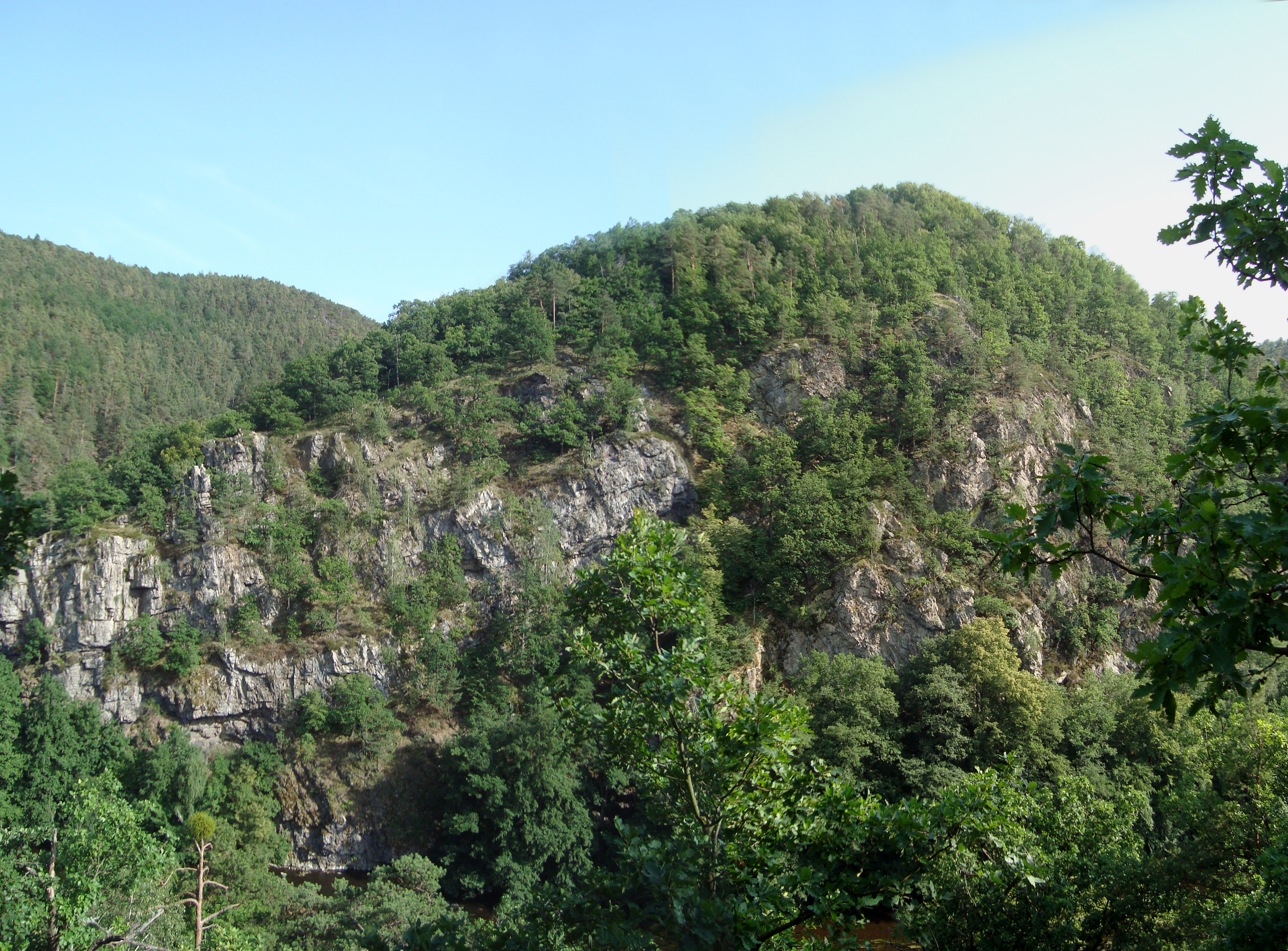 Pohled z Velké skály na protější břeh řeky Jihlavy. Přírodní park Střední Pojihlaví, Česká republika, jižní Morava